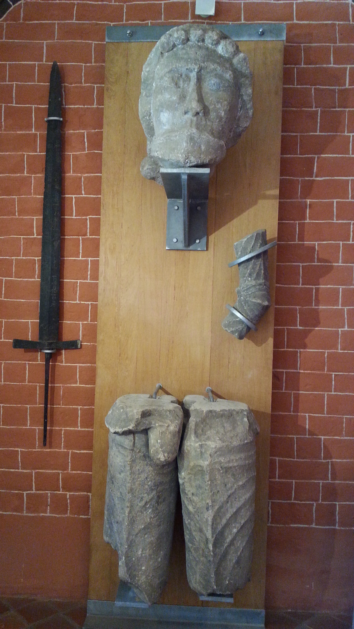 Bruchstücke des historischen Roland aus dem 18. Jahrhundert. Sie wurden 1743 am ursprünglichen Standort vergraben, 1877 wiederentdeckt und 1979 an das Prenzlauer Museum übergeben.